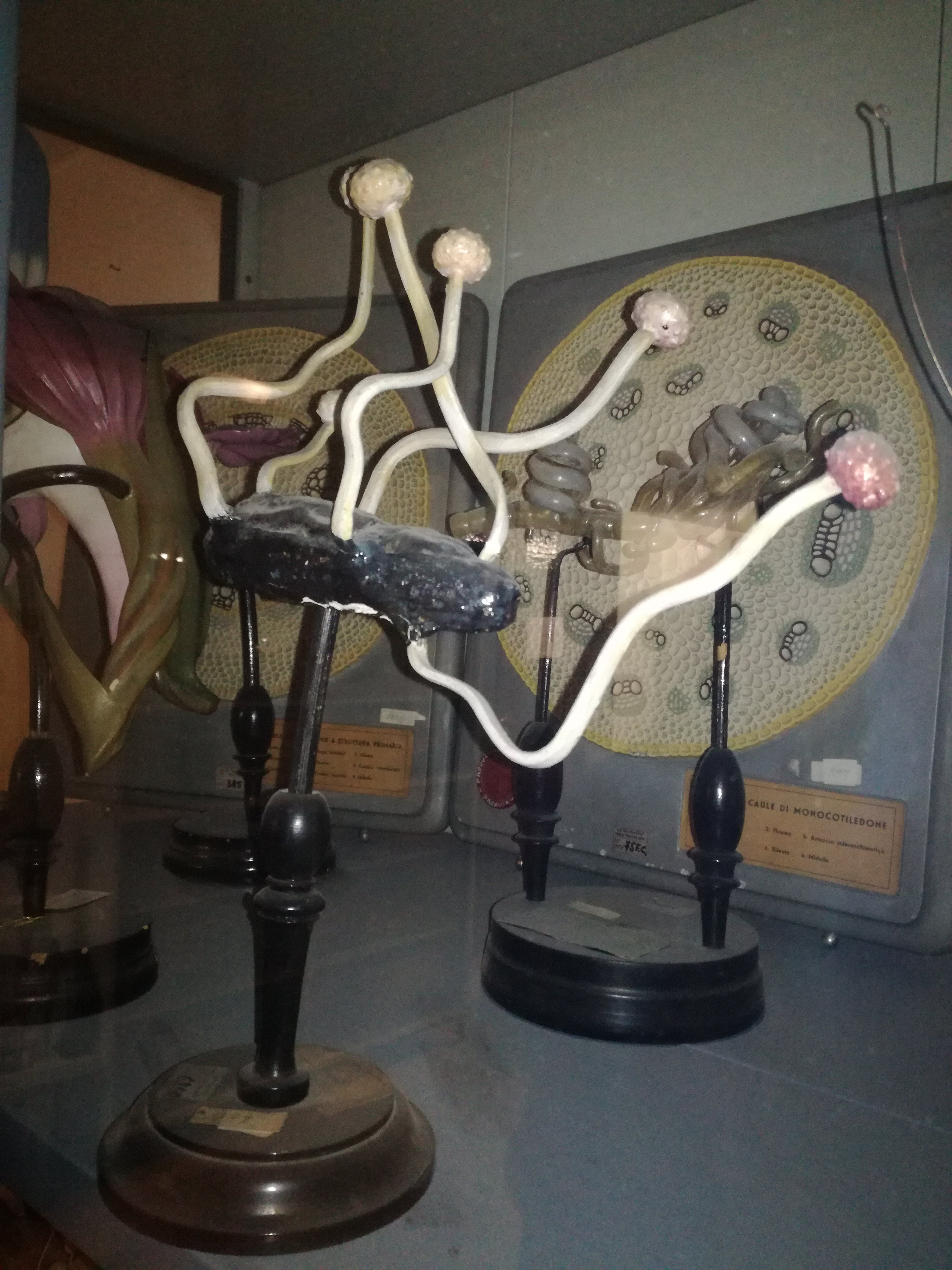 Modelli botanici della manifattura Brendel conservati al liceo ginnasio Dante di Firenze